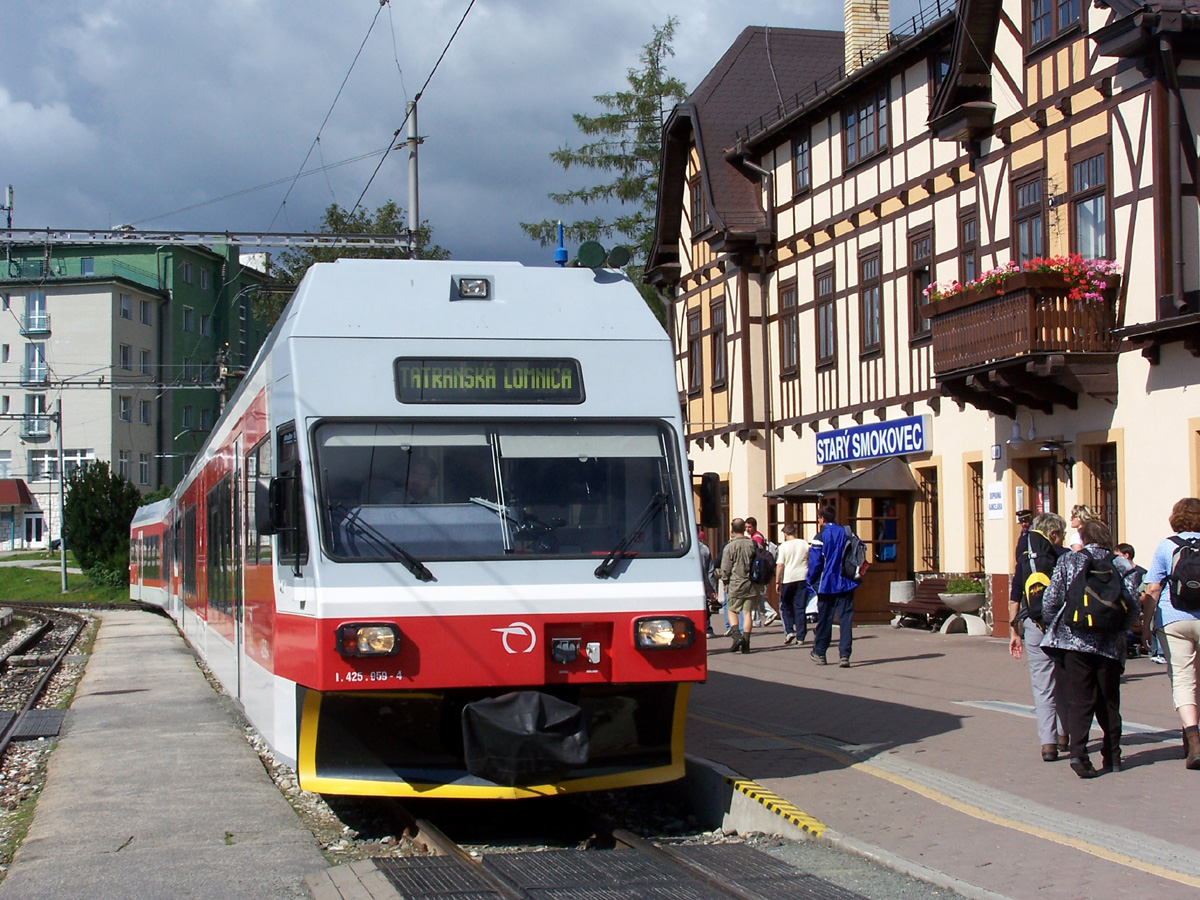 TEŽ